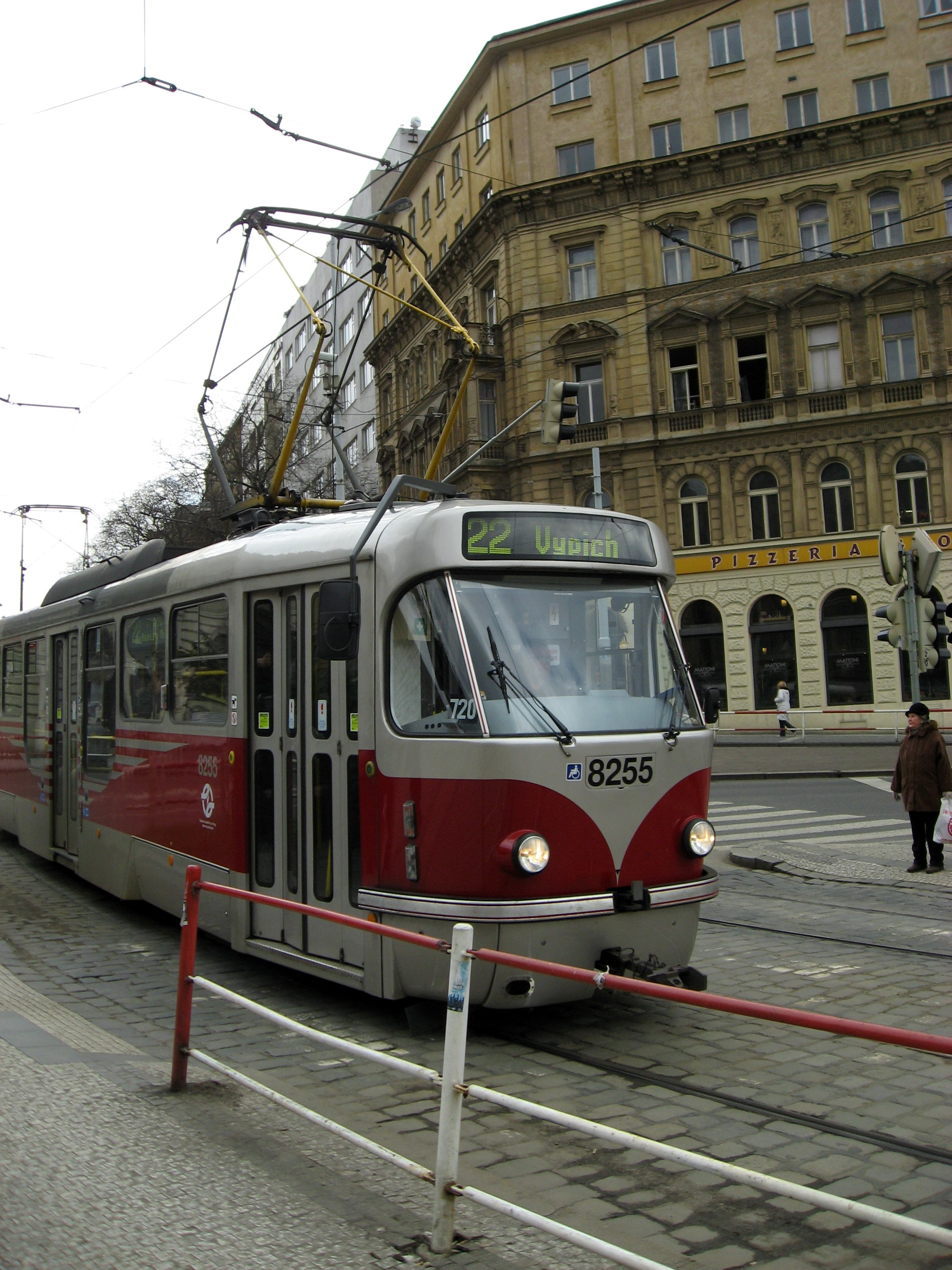 Tatra T3R.PLF na Míráku